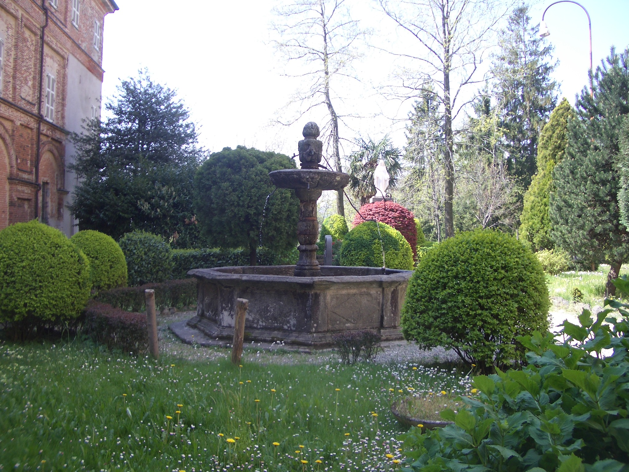 Santuario della Beata Vergine di Loreto, Old Fountain, Graglia (Biella), Italy